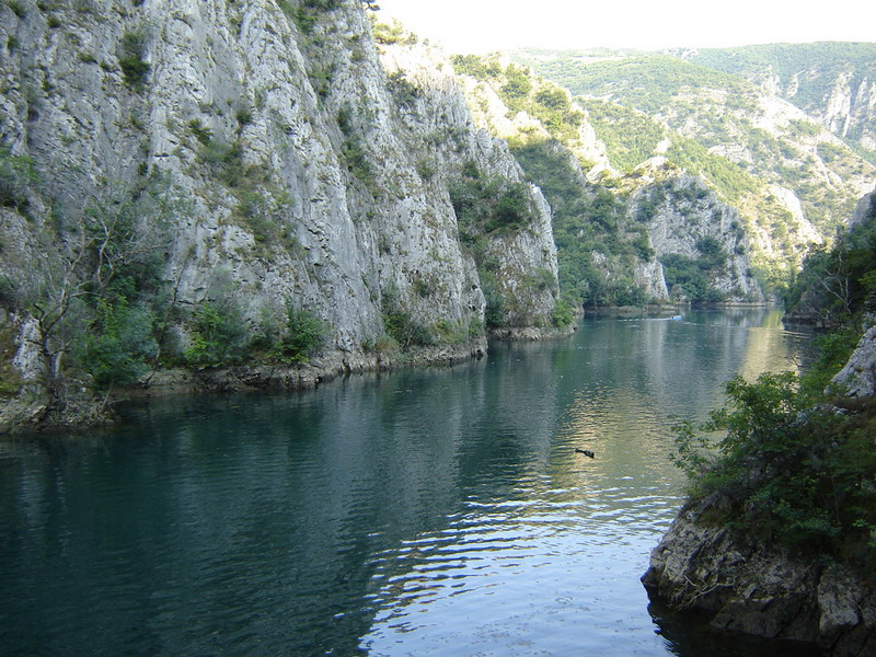 Езерото Матка, Република Македония.